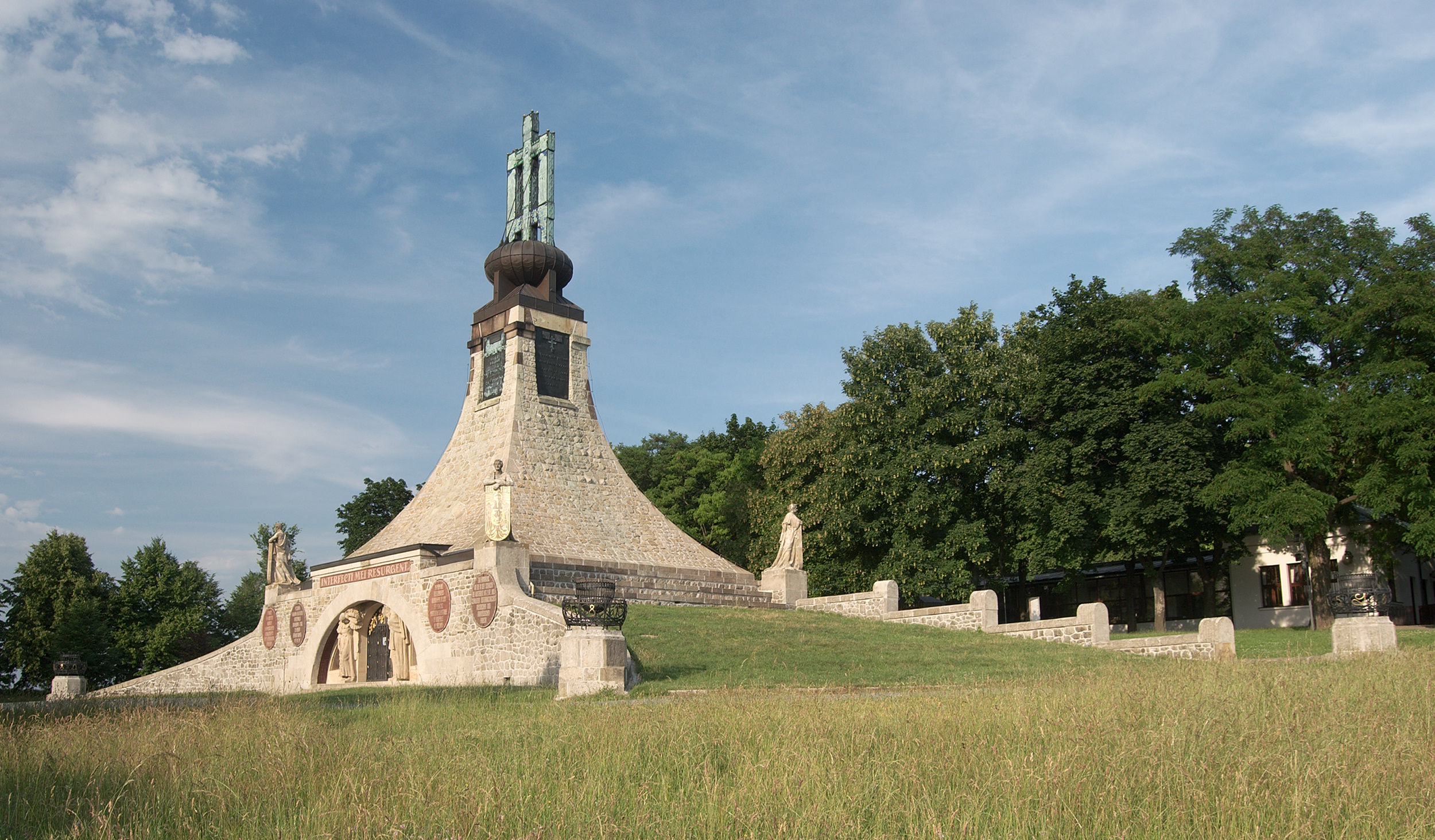 Mohyla míru od jihozápadu